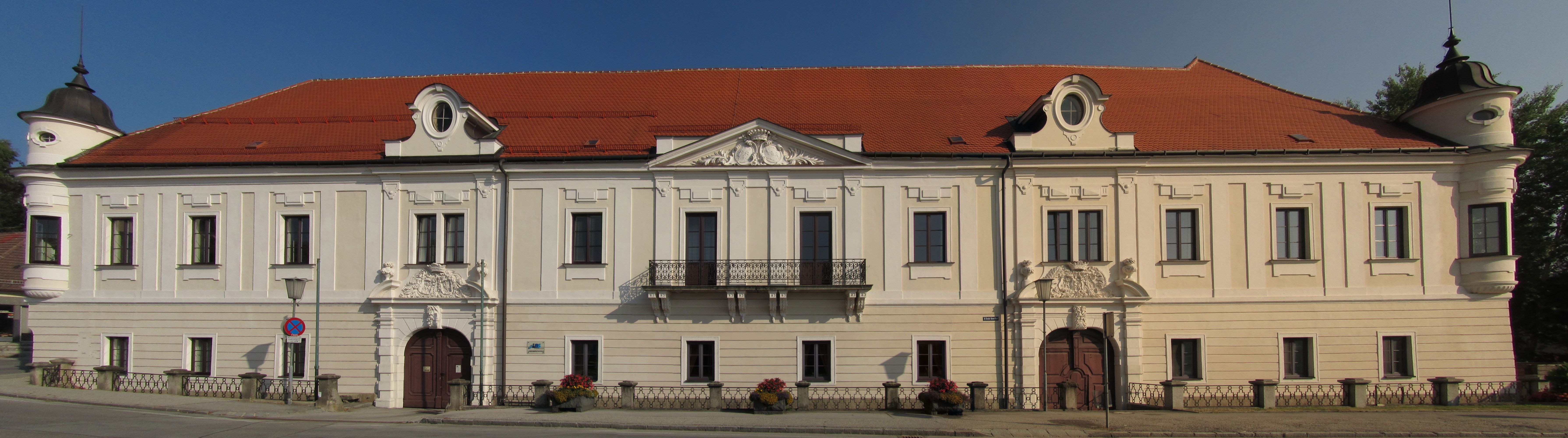 Schloss Schrems